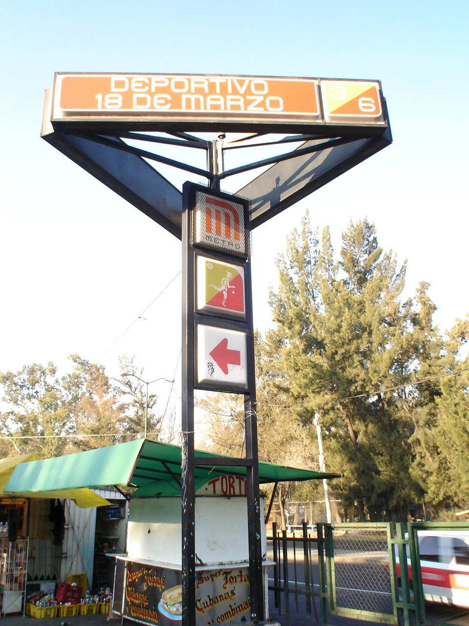 ESTACION DEPORTIVO 18 DE MARZO